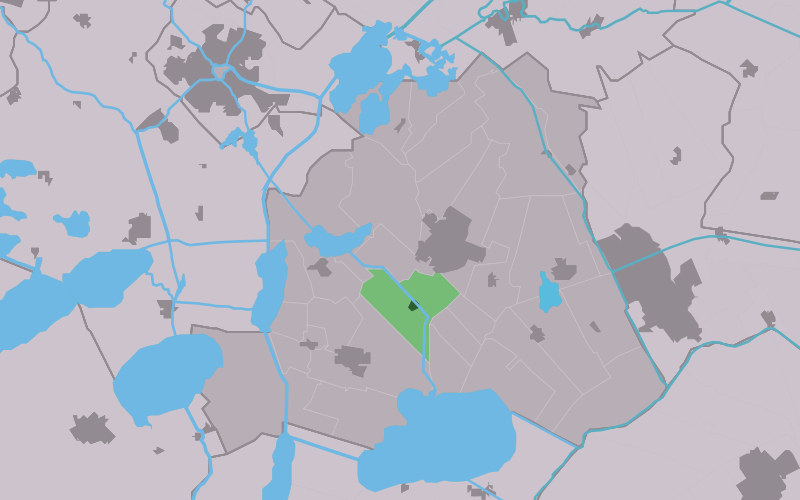 Kaartsje fan himrik fan Skarsterbrêge